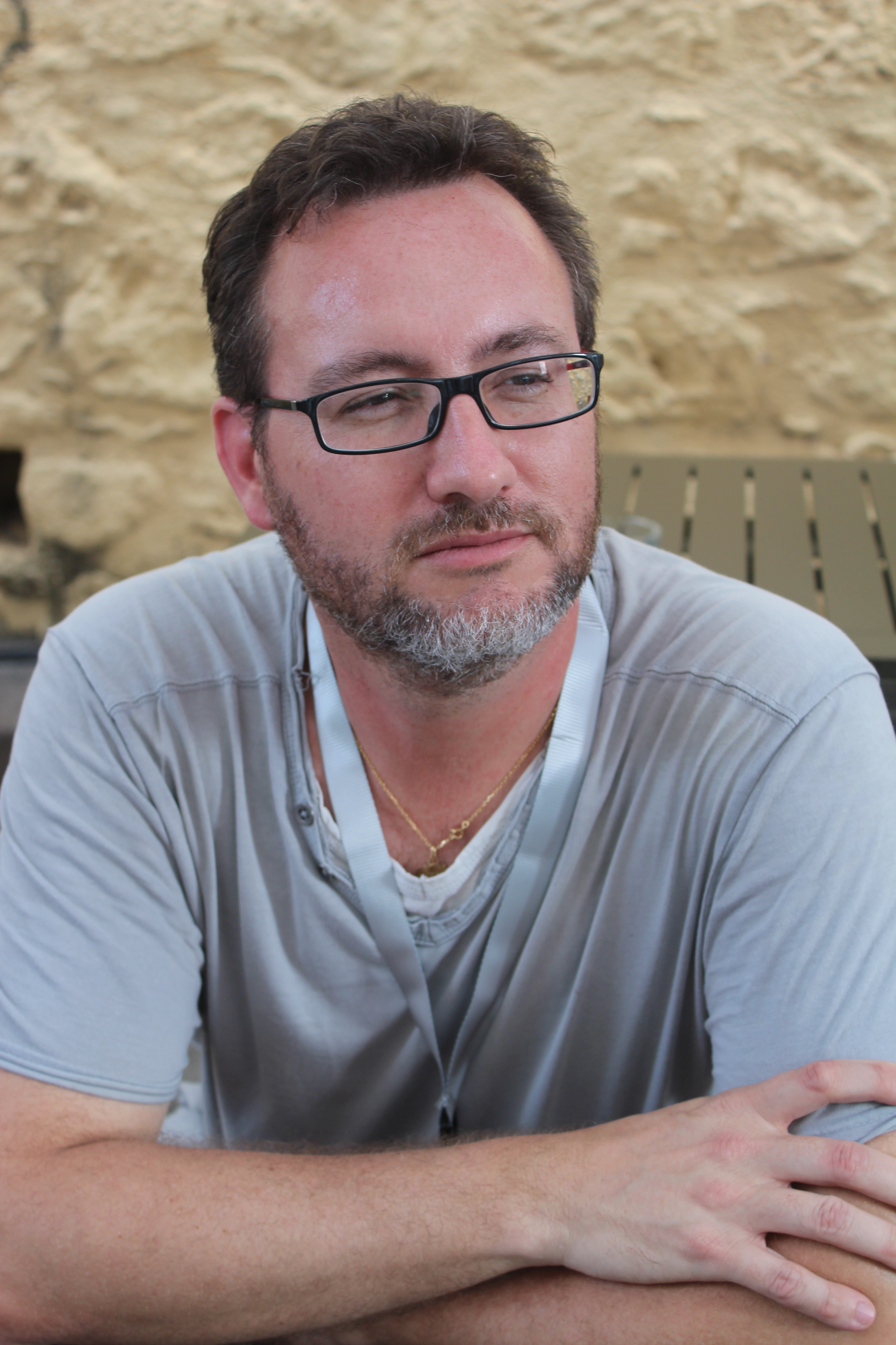 Téhem lors du Cyclone BD 2015.